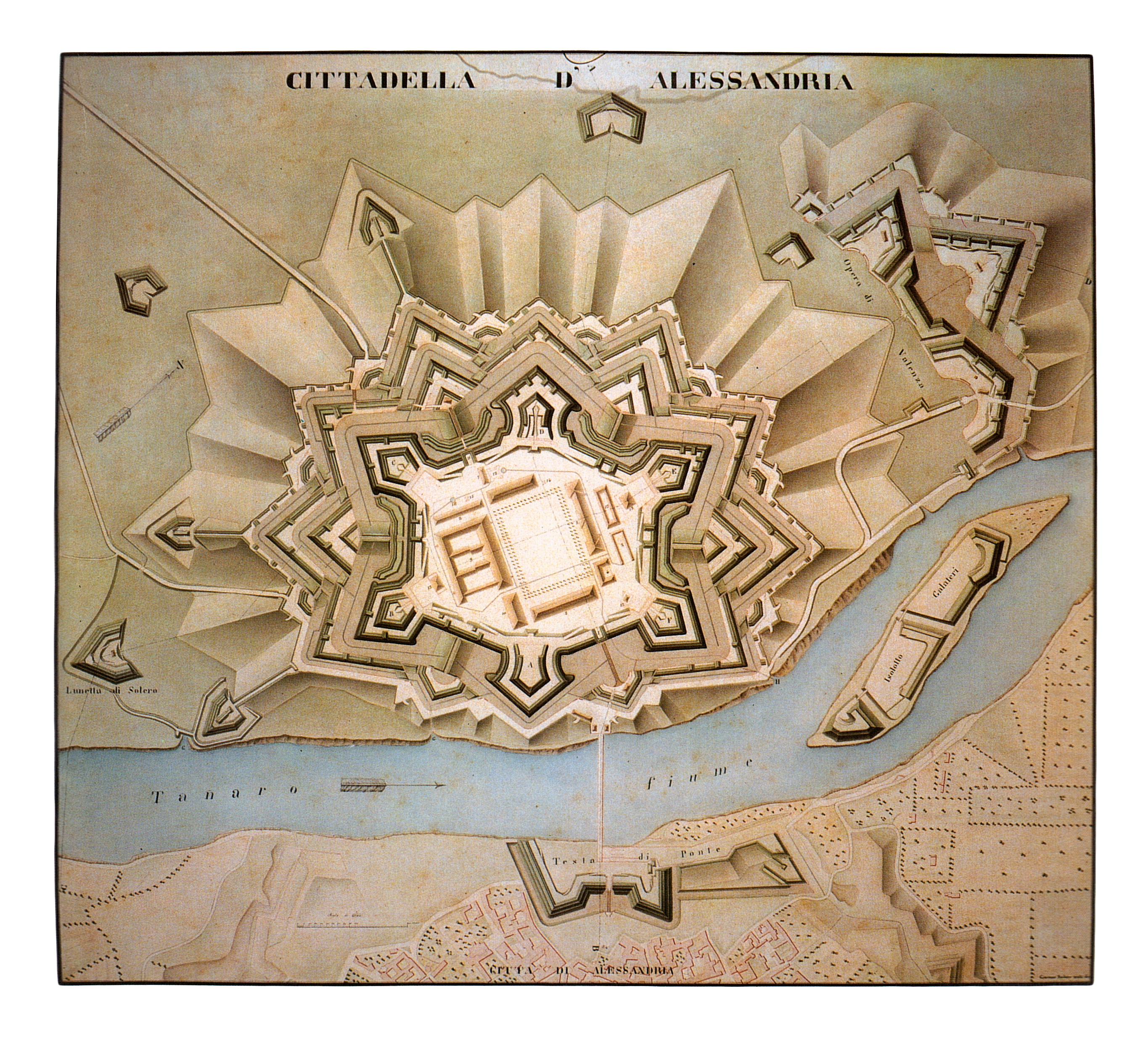 Cittadella di Alessandria, 1846. Massima espansione delle fortificazioni. Disegno a china nera e rossa, acquerellato.